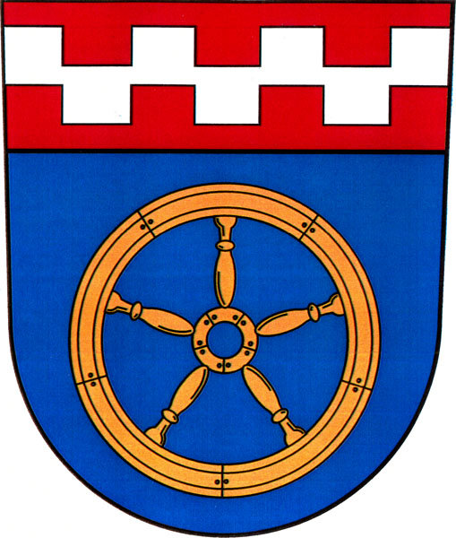 Znak obce Popelín